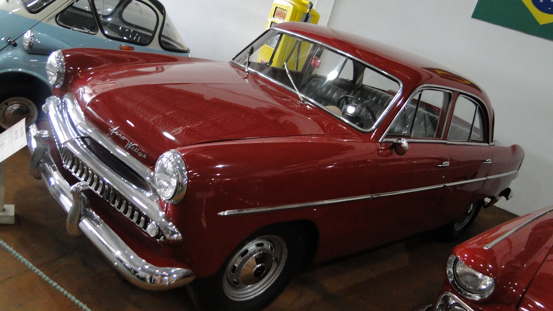 Aero Willys, ano 1962. Acervo do Museu de Armas, Veículos e Máquinas Eduardo André Matarazzo